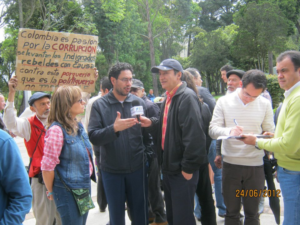 El congresista Iván Cepeda en jornada de recolección de firmas para el referendo revocatorio de la Reforma a la Justicia en Colombia de 2012